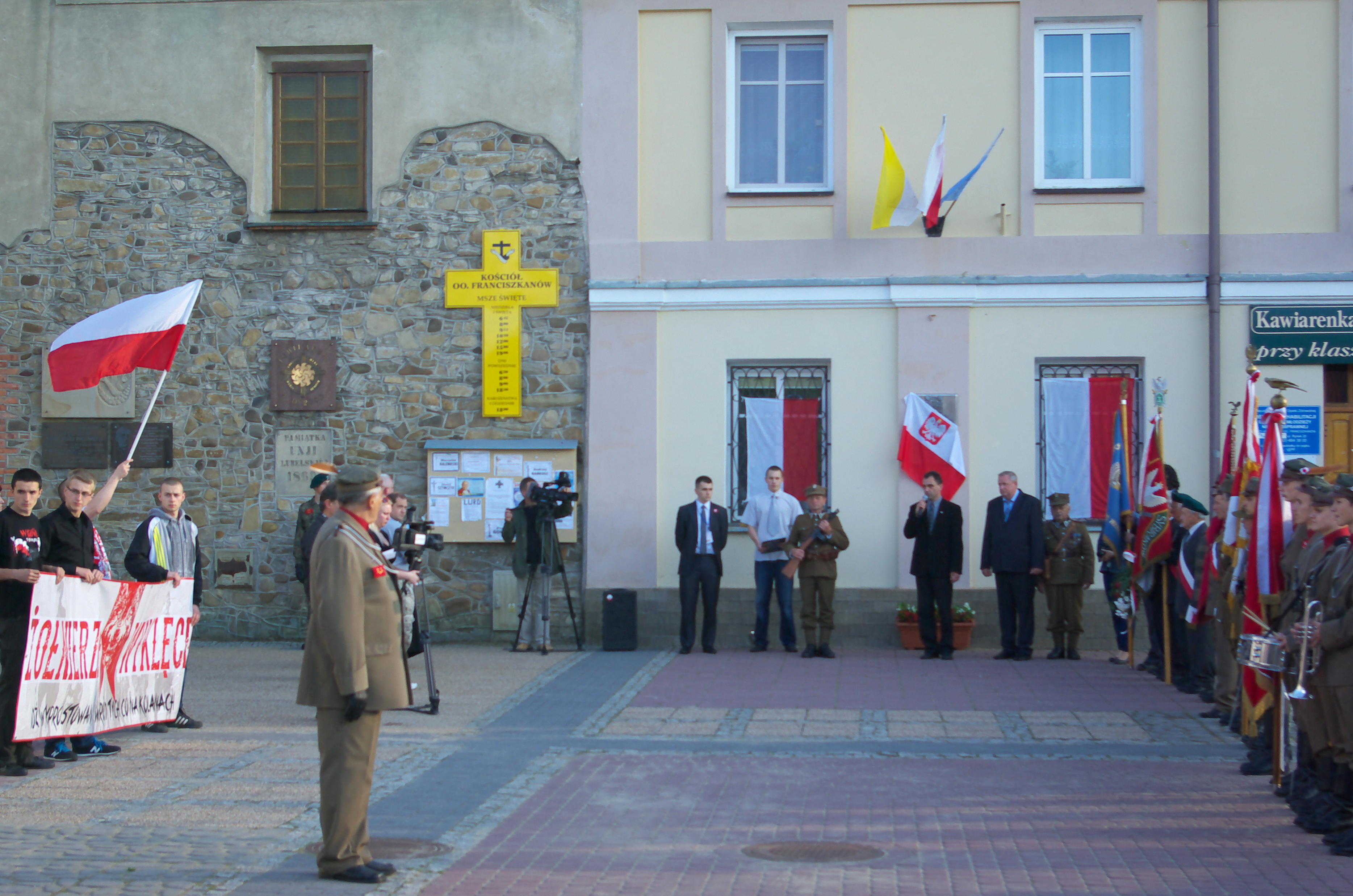 4 czerwca 2014. Odsłonięcie tablicy upamiętniającej trzech żołnierzy NSZ straconych w egzekucjach w mieście 24 maja i 4 czerwca 1946, chor. Henryka Książka powieszonego 4.VI.1946 r. na sanockim rynku oraz Władysława Kudlika i Władysława Skwarca powieszonych 24.V.1946 r. na sanockim stadionie.